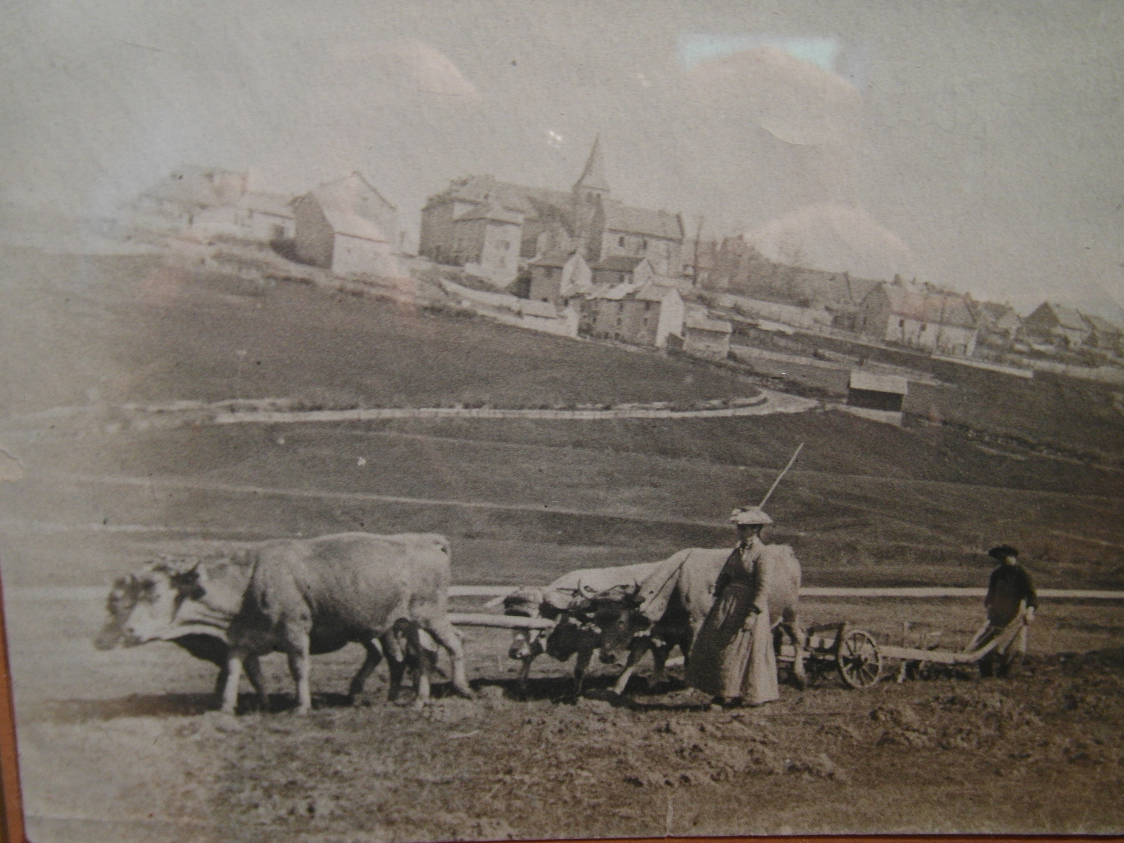 Carte postale 1900 de Villard de lans